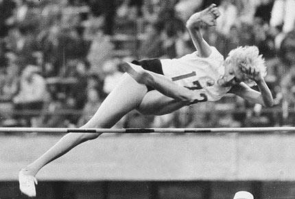 Descrizione: Iolanda Balaş Autore: anonimo; file caricato da Yiyi (A tua disposizione!)